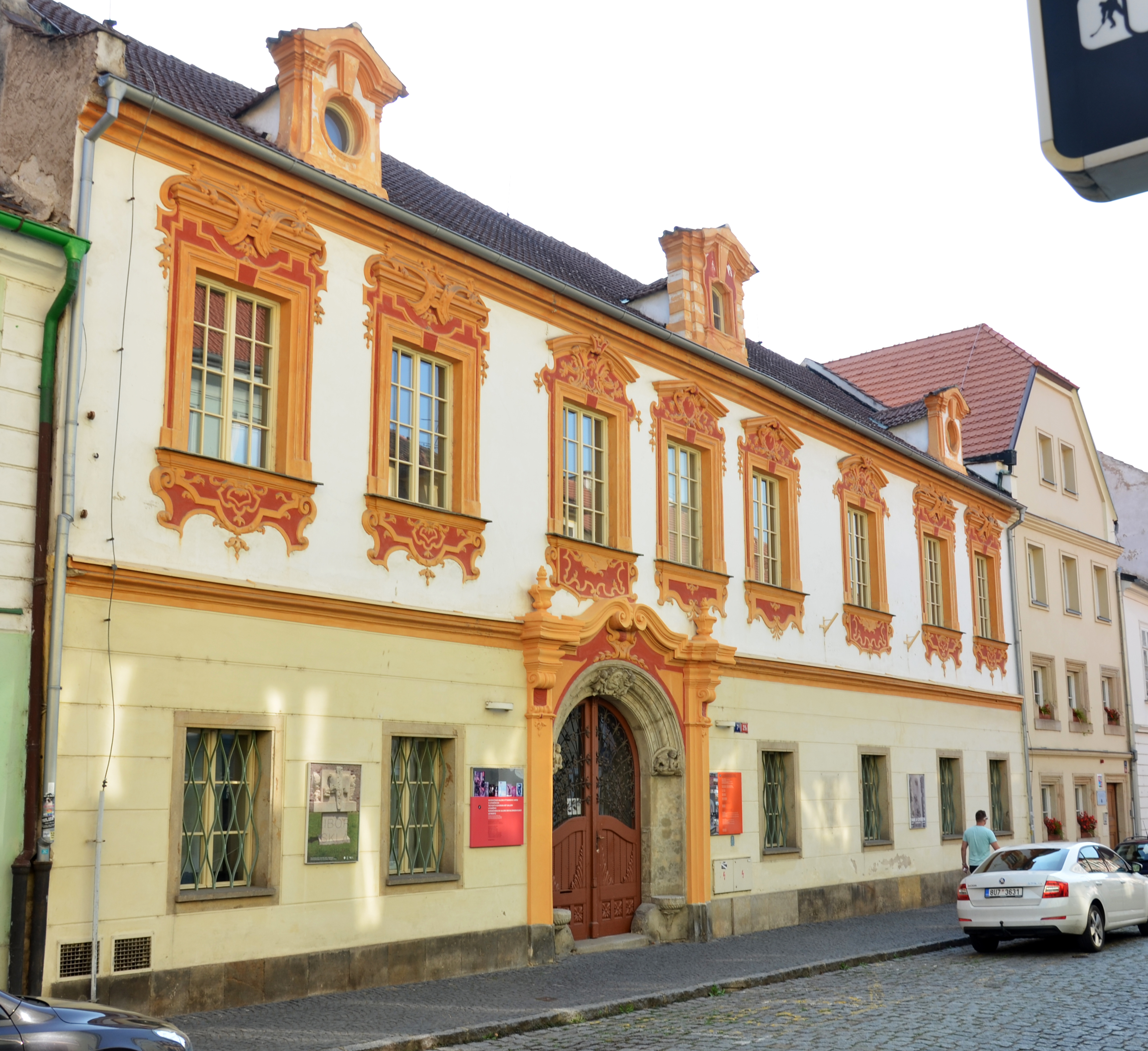 Severočeská galerie výtvarného umění v Litoměřicích, budova galerie, za ní provozní budova SČGVU